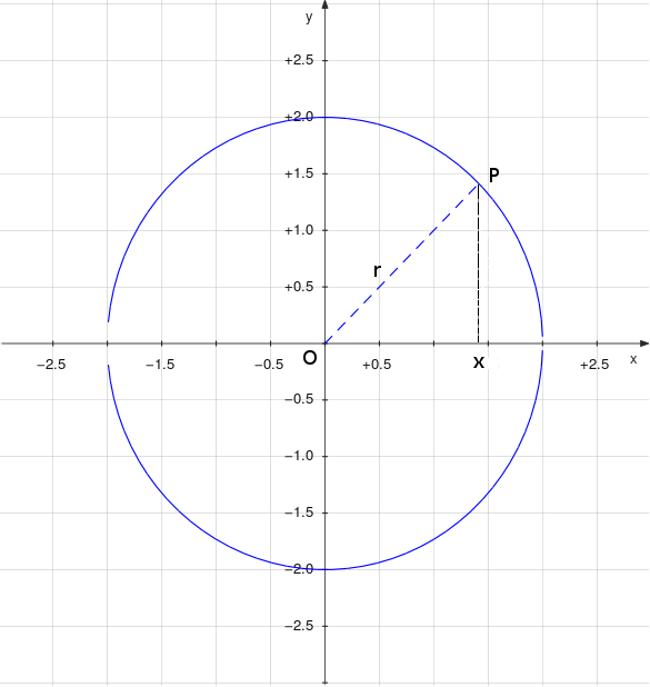 Circunferencia de radio r.